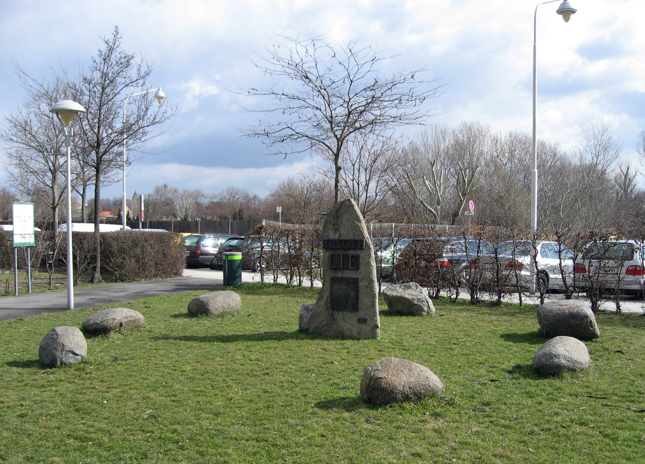 Wien, Donaustadt, Trygve-Lie-Park